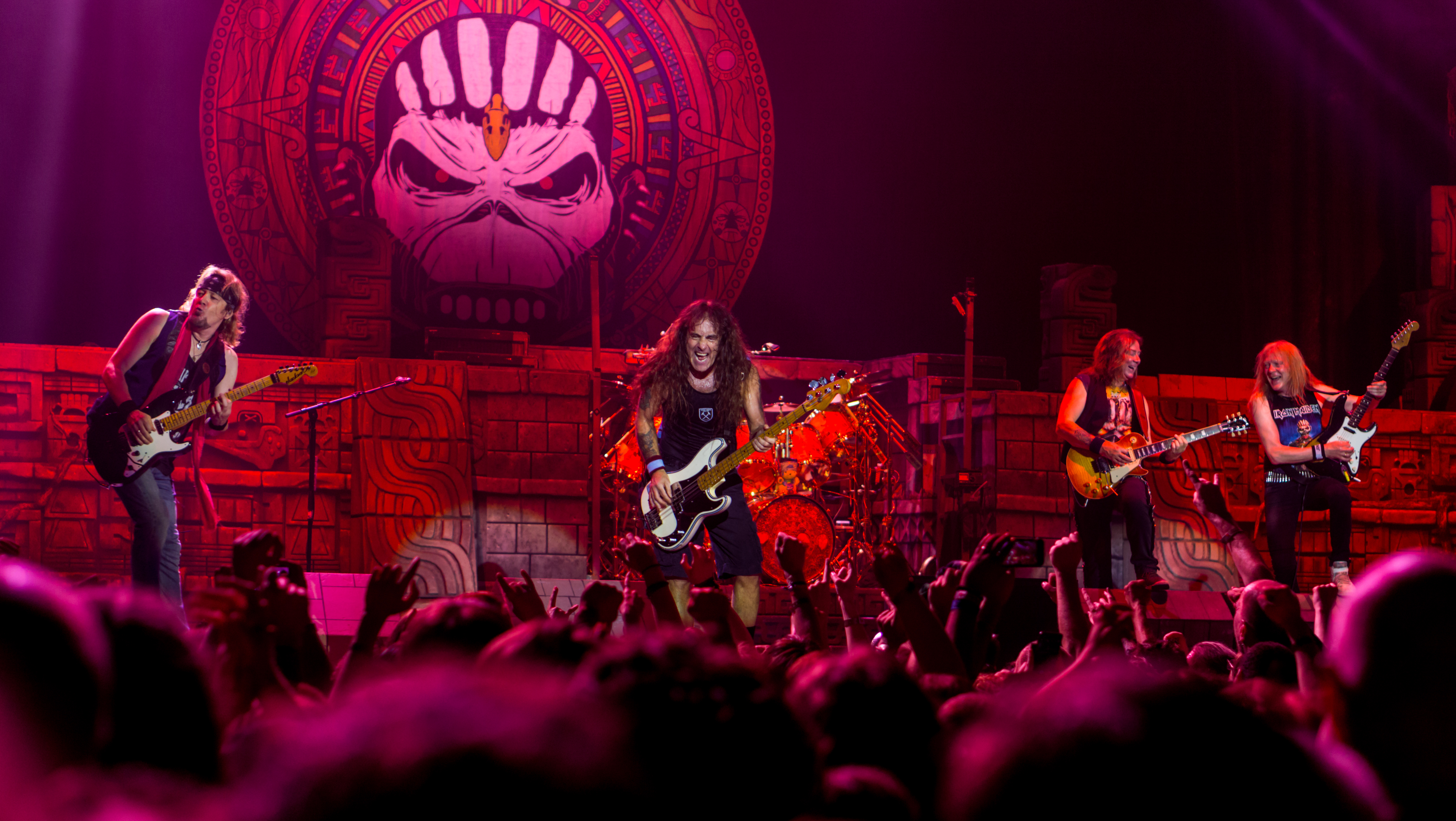 IronMaidenO2_270517-24